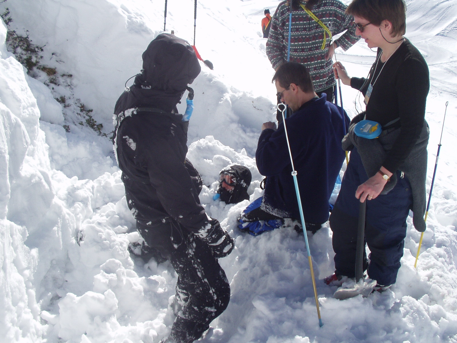 Simulation einer Lawinenwerschüttung